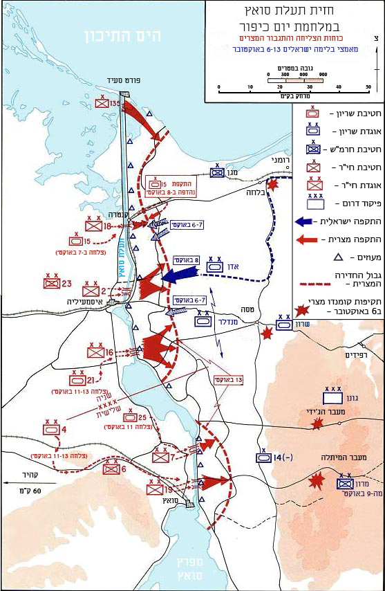 קרבות בחזית תעלת סואץ בחצי האי סיני במלחמת יום הכיפורים בין התאריכים 6 באוקטובר ל- 13 באוקטובר 1973